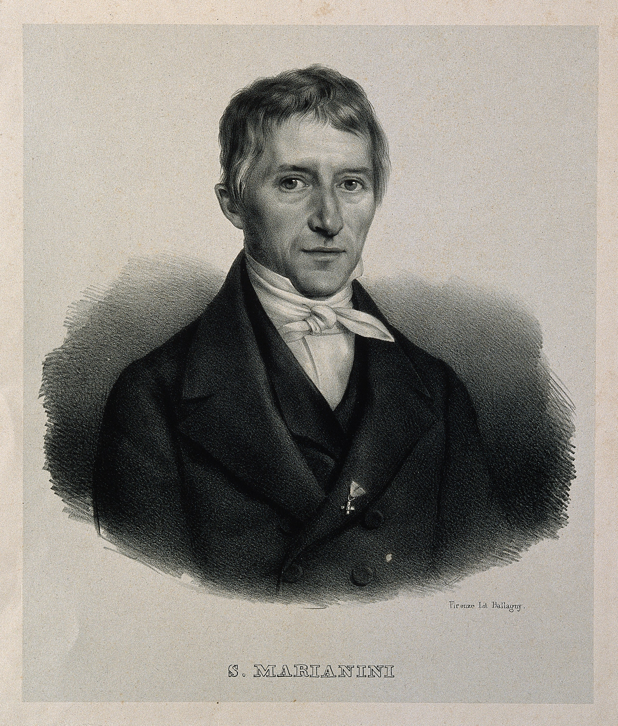 Genre/Technique: Portrait prints. Lithographs. Subject name: Marianini, Stephano Giovanni, 1790-1866.